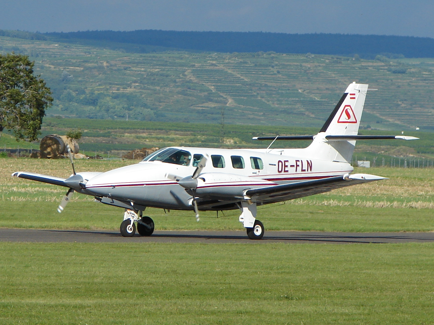 Cessna T303 Crusader